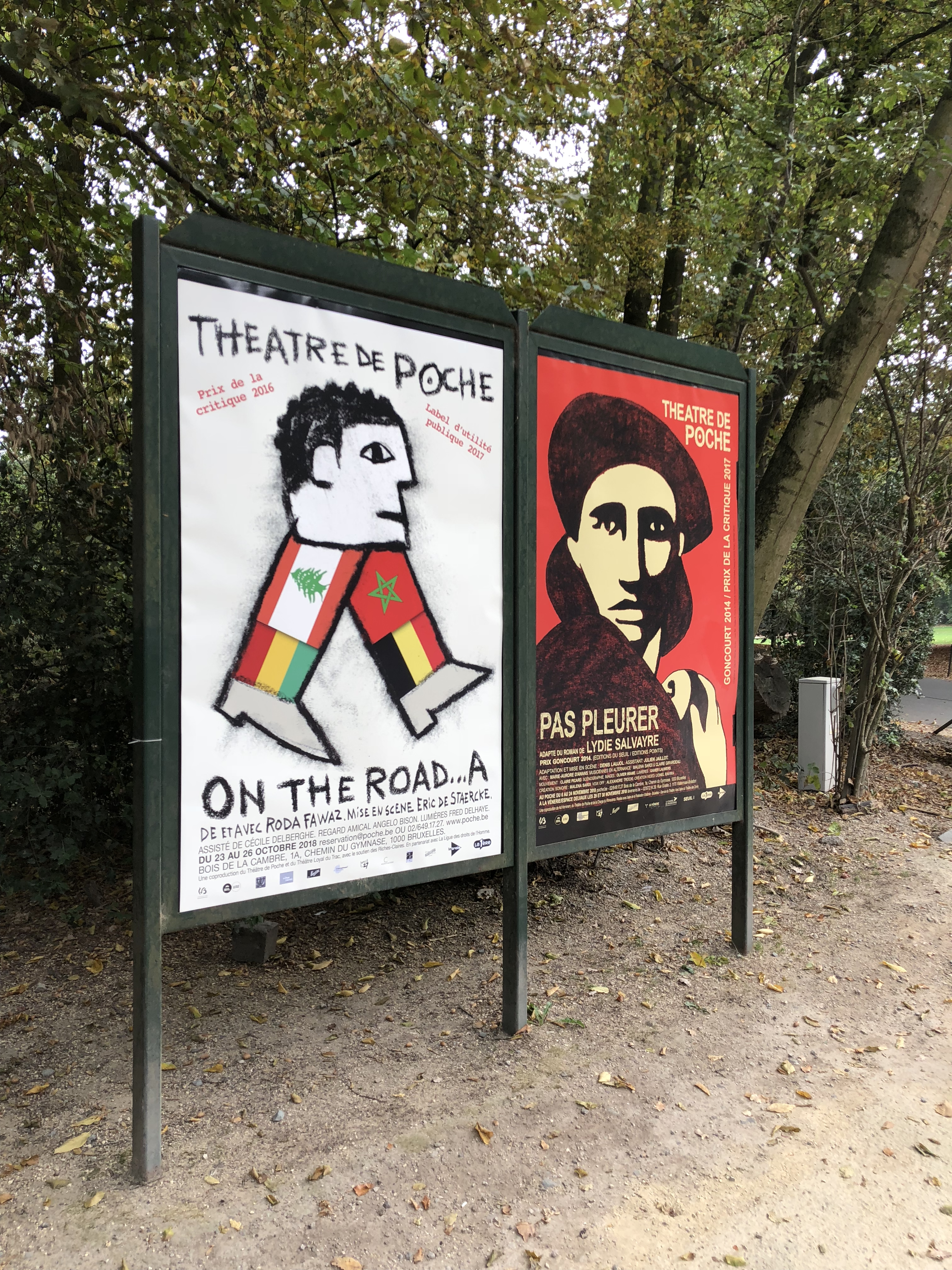 Théâtre de Poche (Bruxelles)